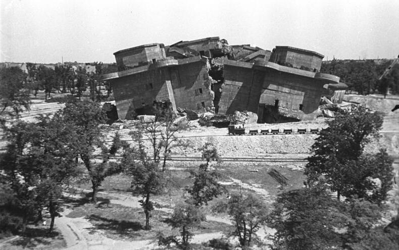 ADN-ZB/Donath Berlin, Gesprengter Bunker im Friedrichshain. Aufn. August 1949